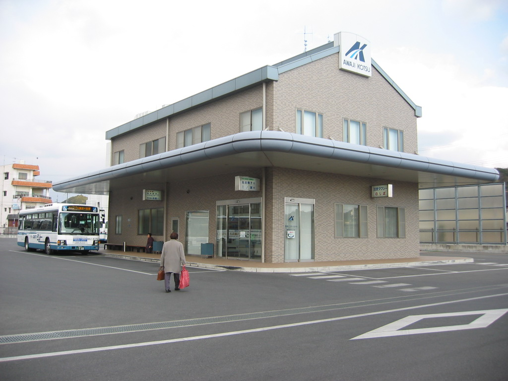 淡路交通福良バスターミナル。旧福良駅跡地に建つ。